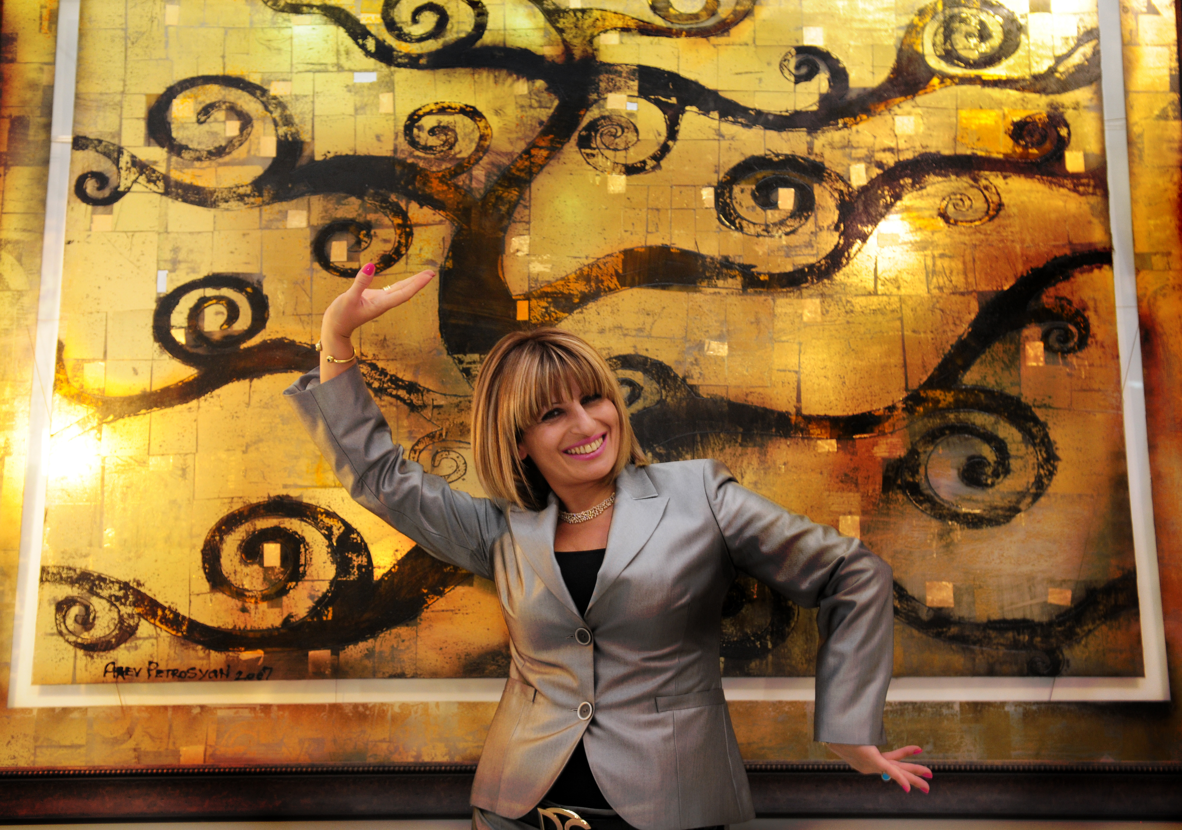 Նկարչուհի-ձևավորող Արև Պետրոսյան